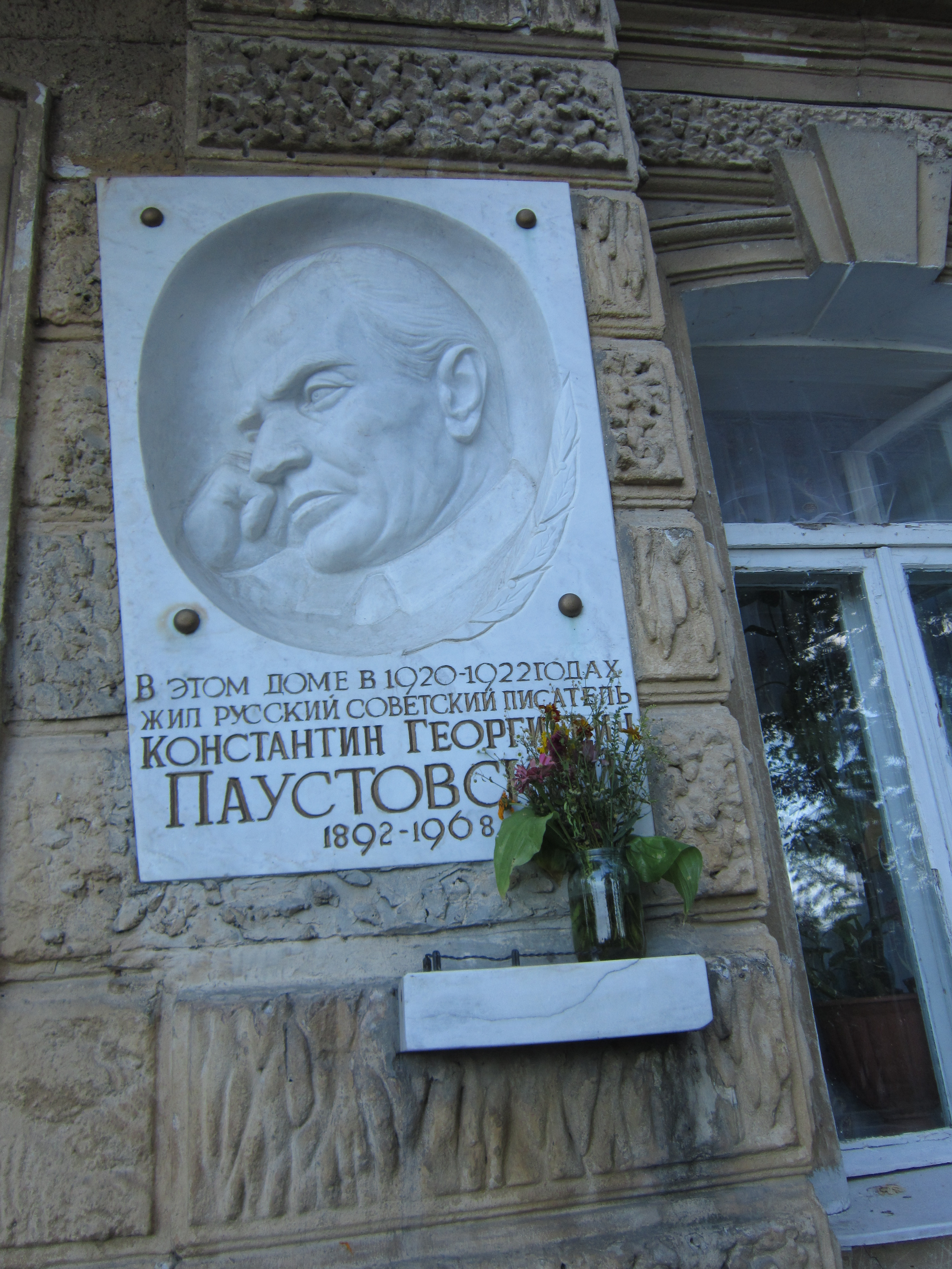 Будинок, у якому жили і працювали Паустовський К.Г. — письменник; Солнцев С.І. — економіст, академік АН СРСР АН УРСР, один з організаторів Одеського політехнічного інституту та Одеського інституту народного господарства, Одеса, вул. Чорноморська, 8